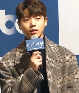 16일 오후 서울시 강남구 논현동 임피리얼팰리스서울 호텔에서 JTBC 새 월화드라마 '검사내전' 제작발표회가 열려 배우 이선균X정려원X이성재X김광규X이상희X전성우가 참석해 기자 질의 응답을 하고 있다.